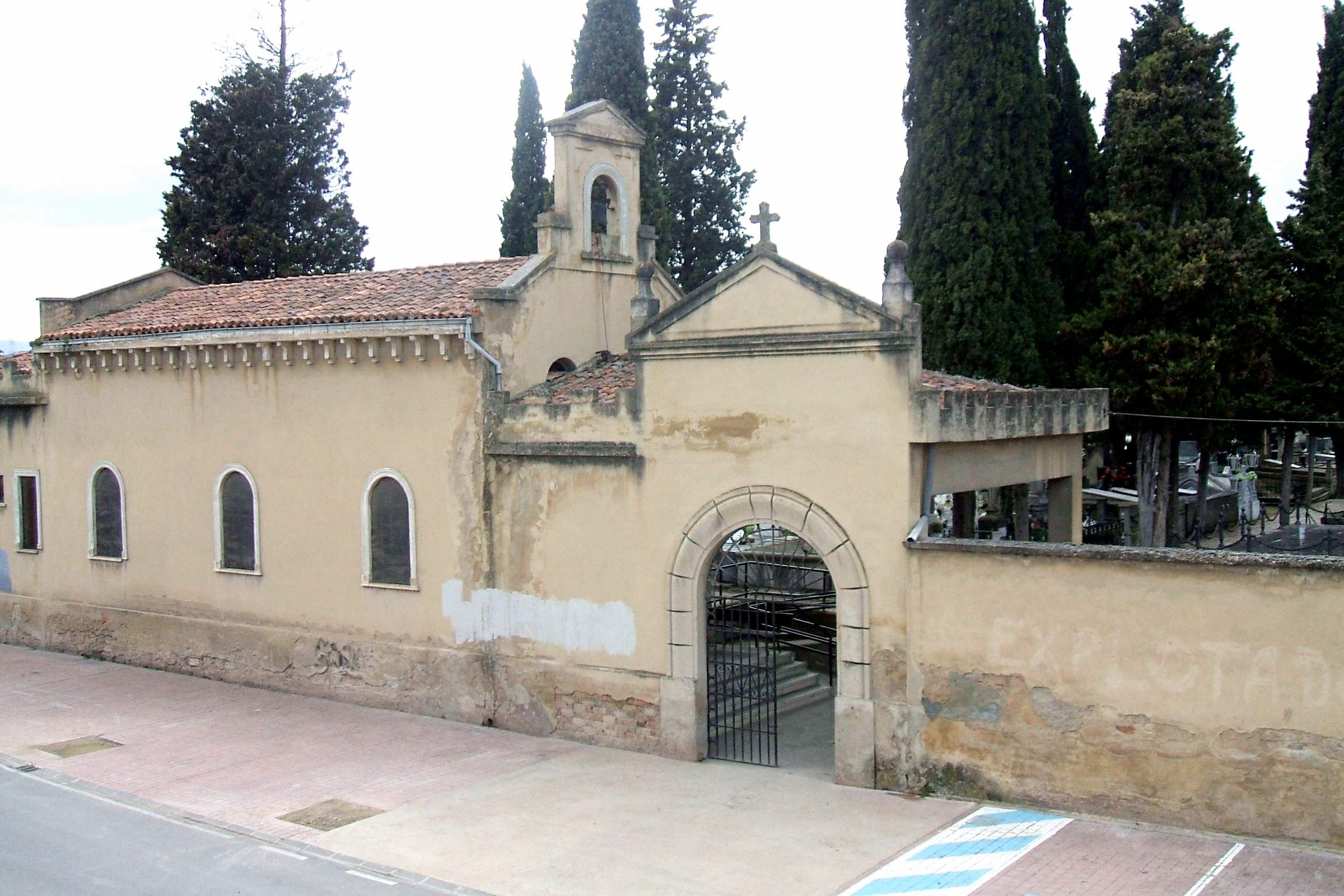 Cementerio de Miranda de Ebro